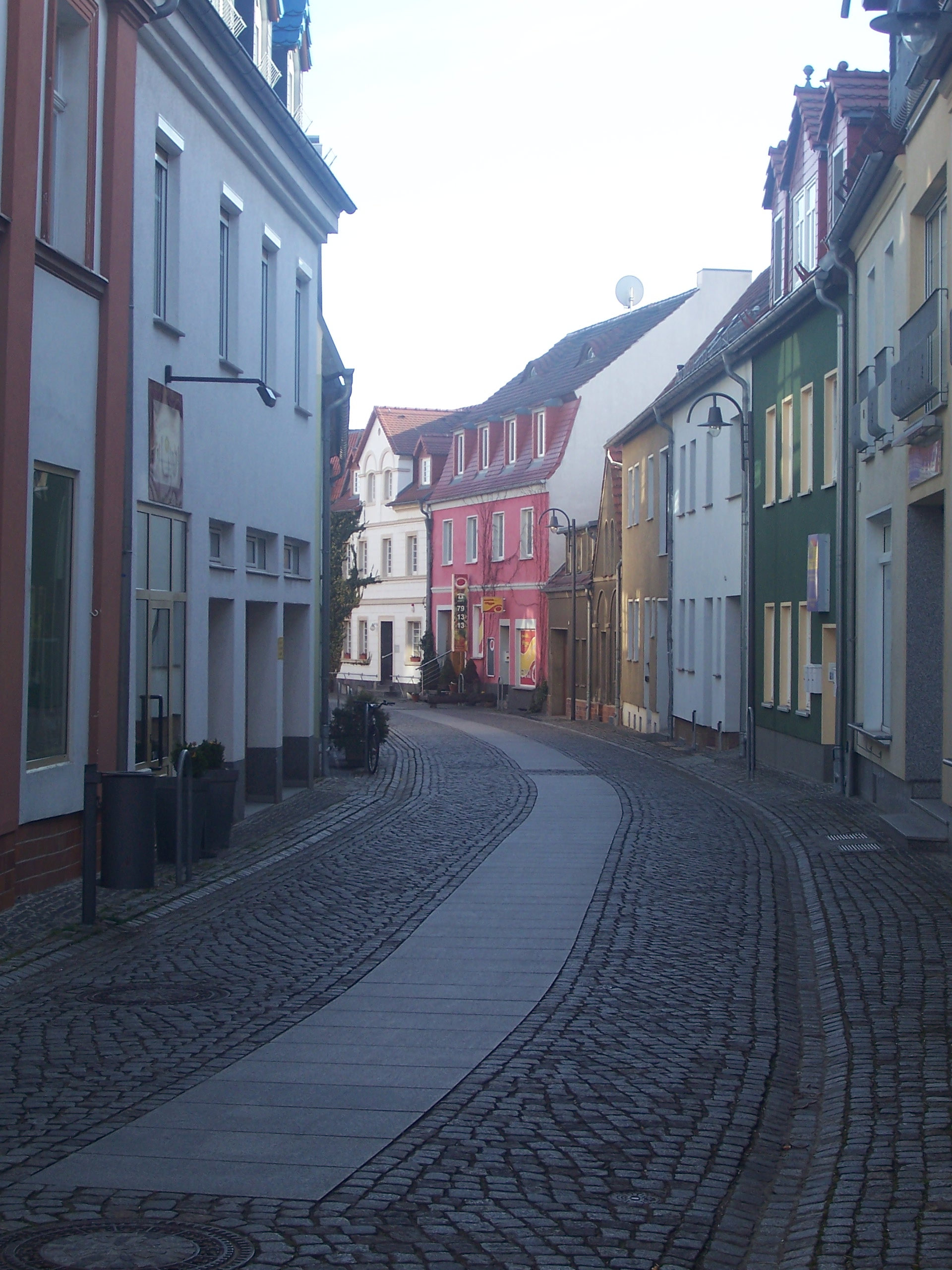 Ein Teil des Senftnberger Altstadtrings die Salzmarktstraße.